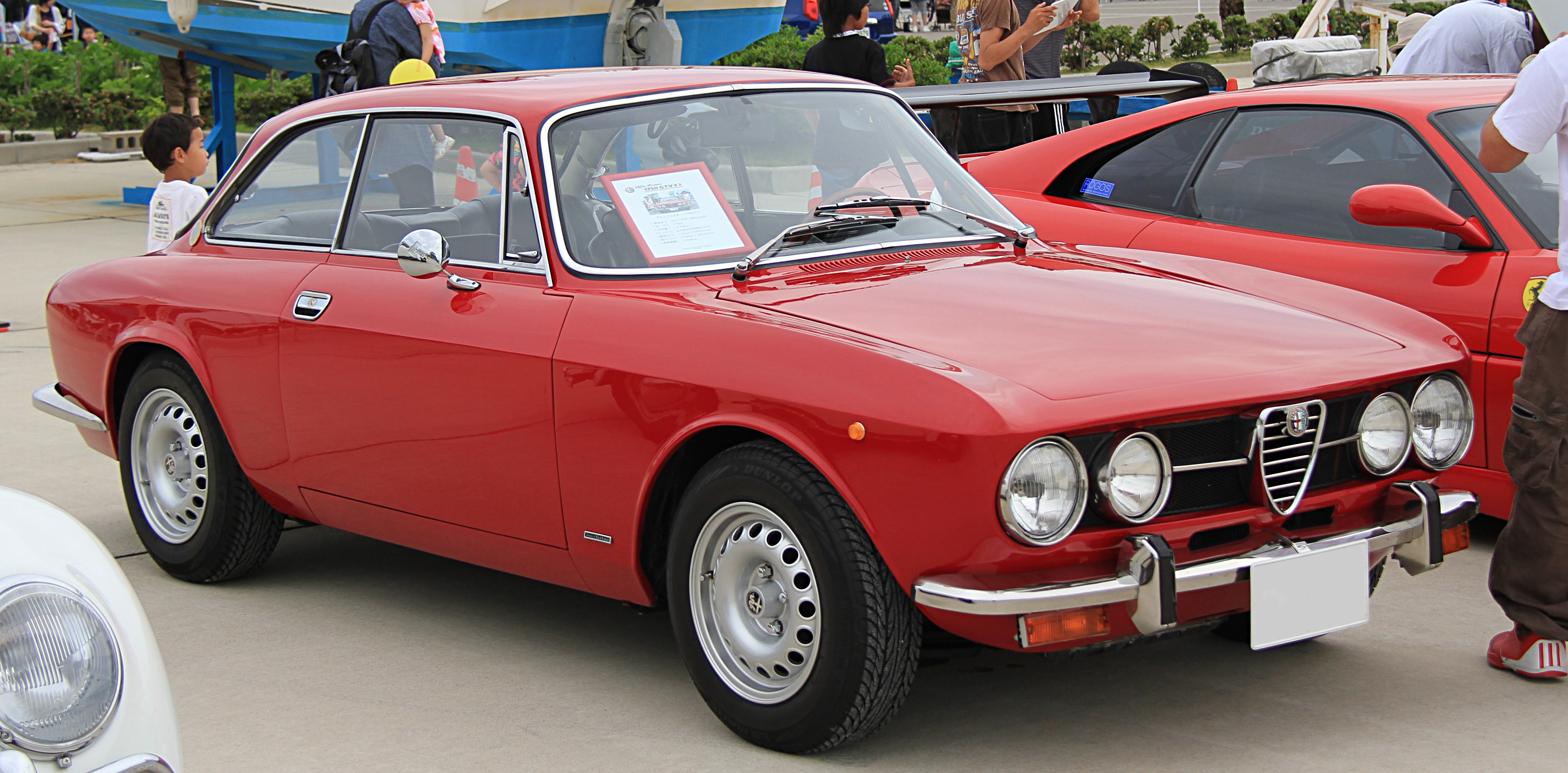 Alfa Romeo 1750